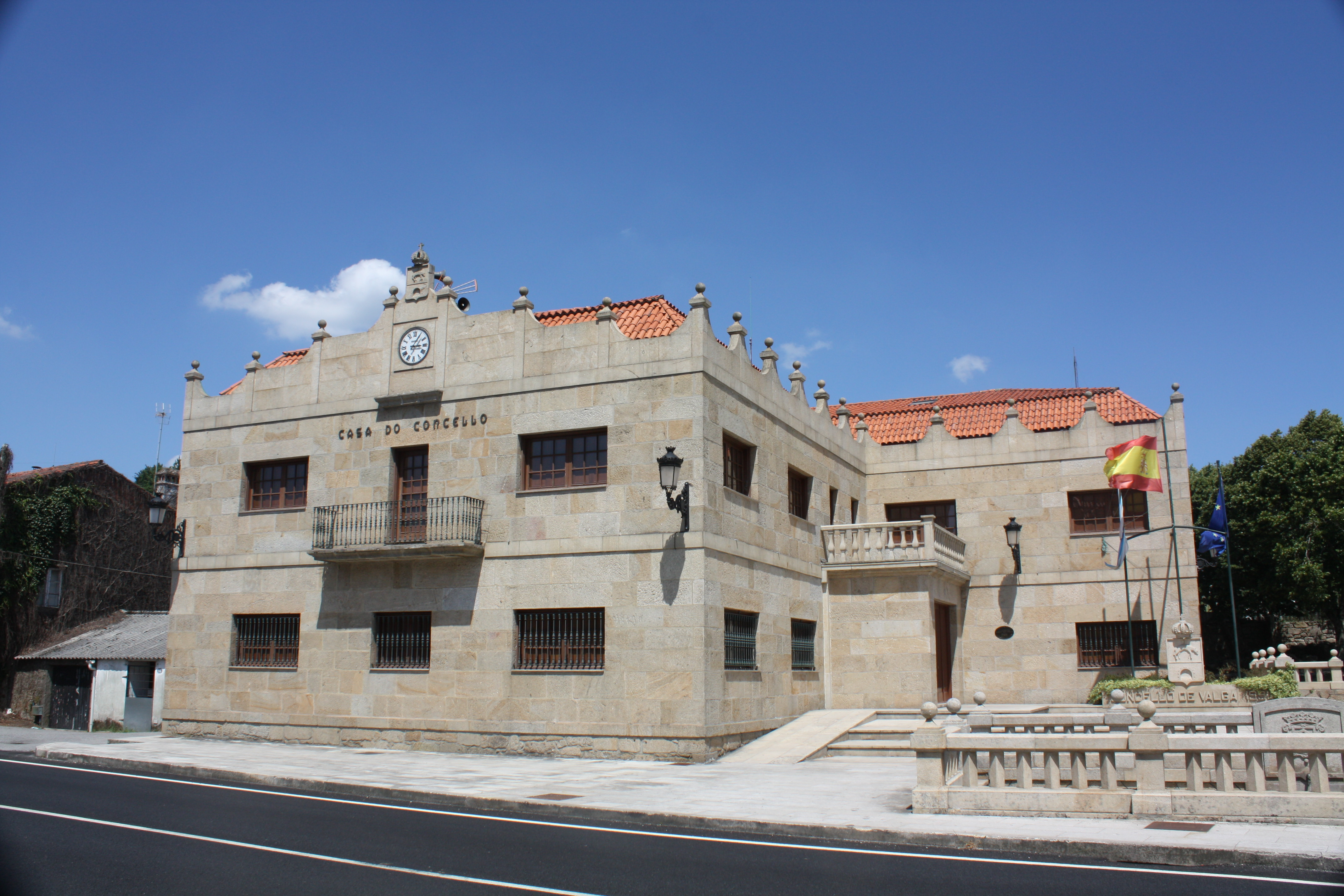 Casa do concello de Valga (Pontevedra).